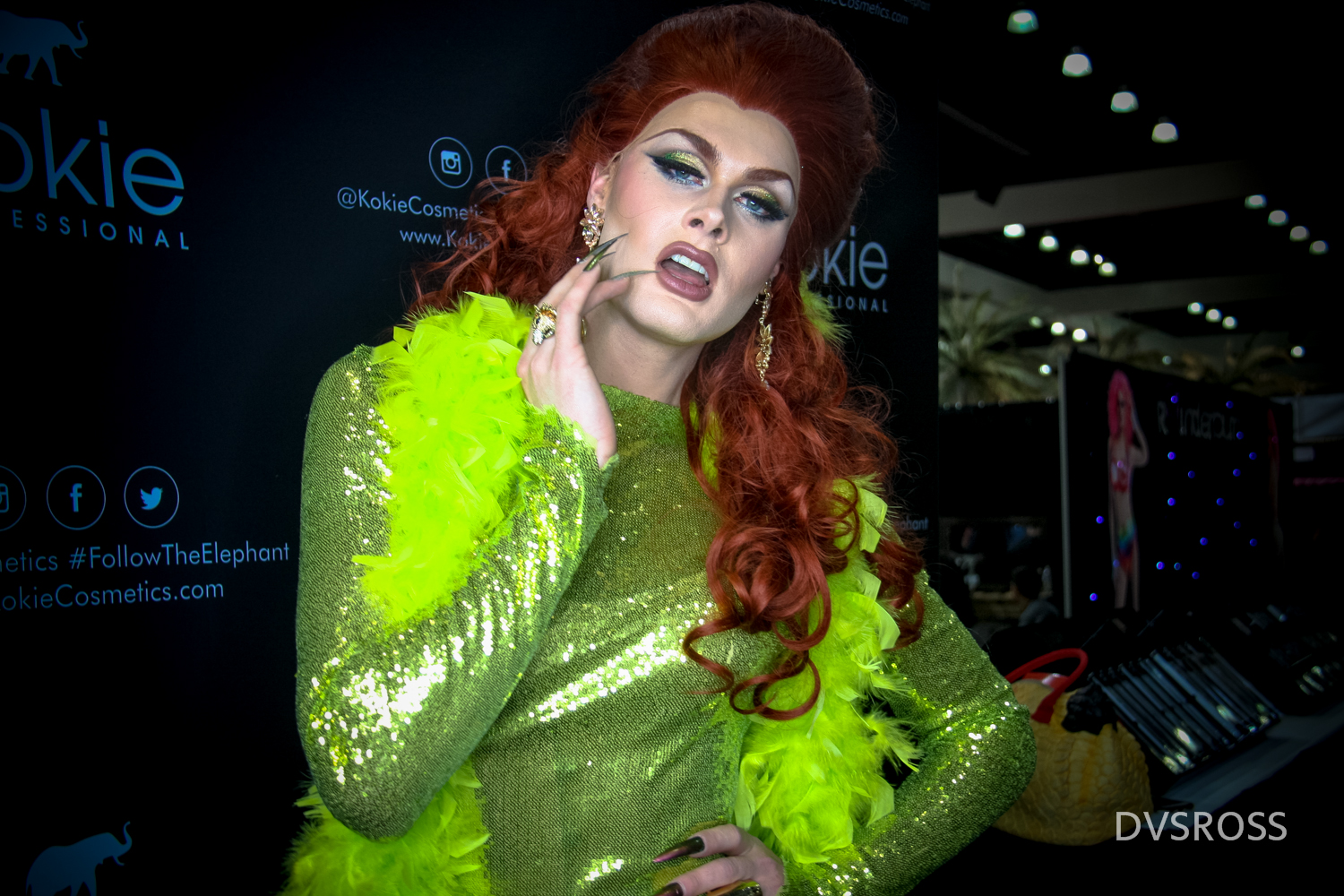 Scarlet Envy at RuPaul's DragCon 2017